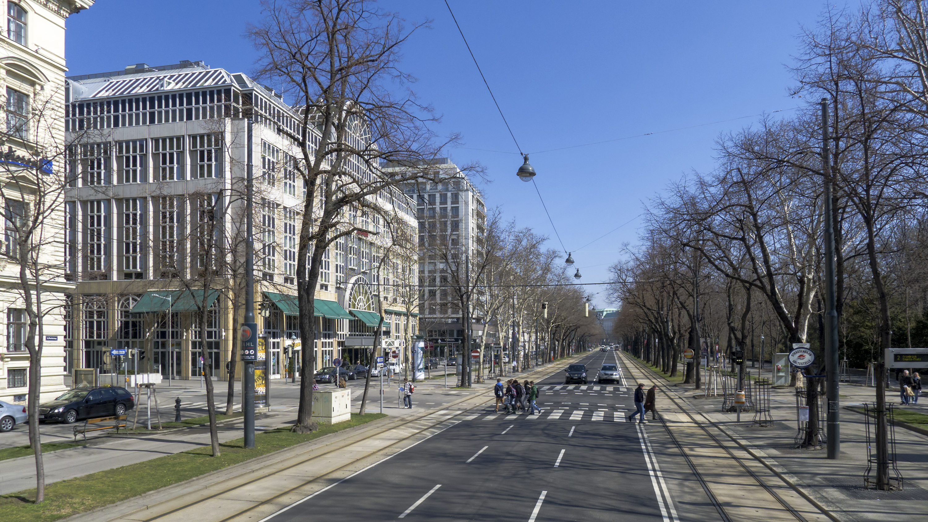 Parkring bei der Himmelpfortgasse Richtung Nordosten